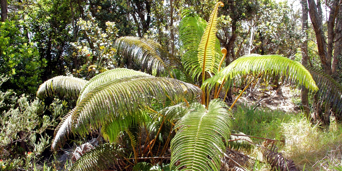 Остров Гвайи. Иллюстрация Второва И.П. для учебника Гавайеведение.